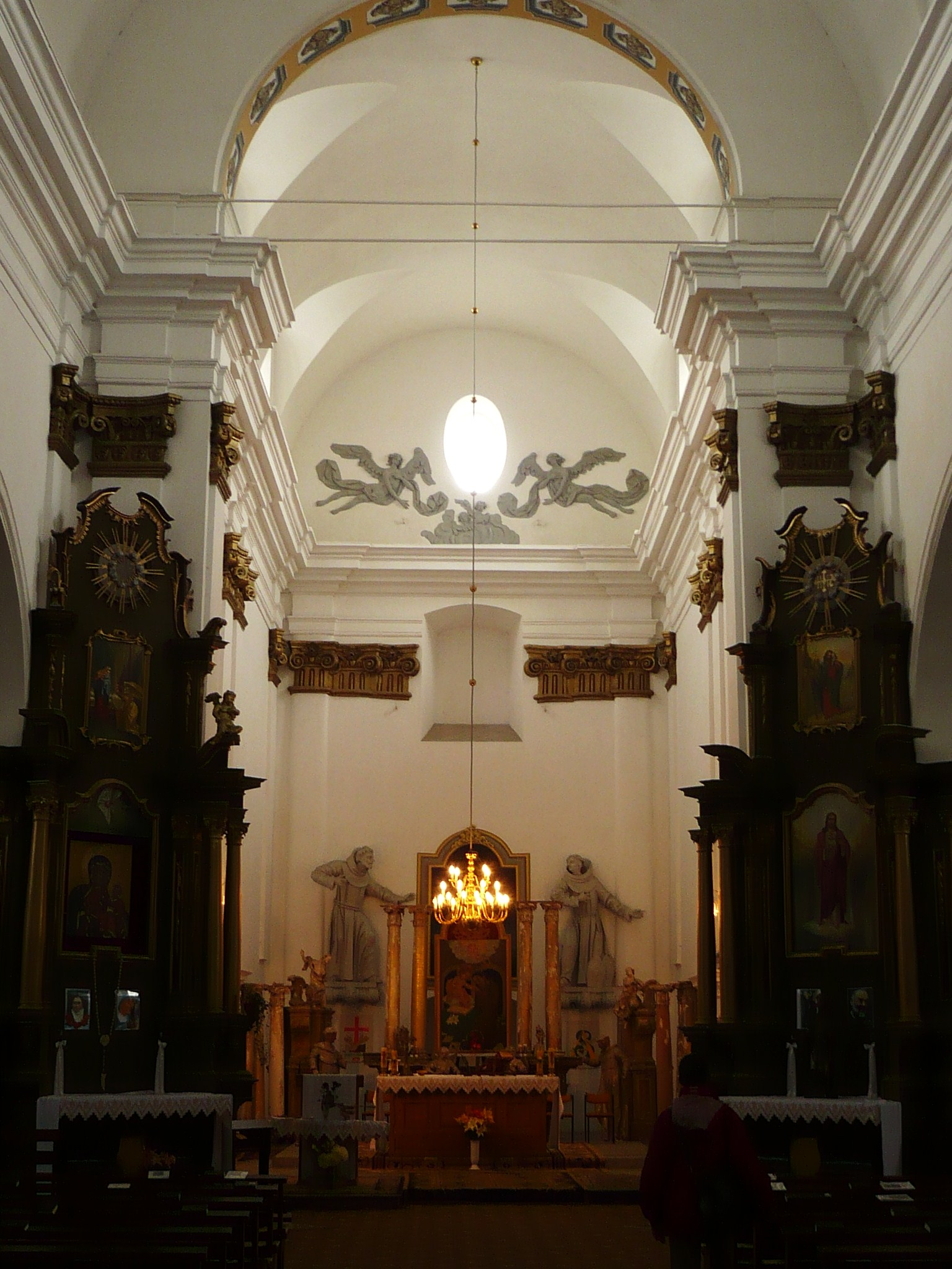 Zbaraż, kościół oo. bernardynów